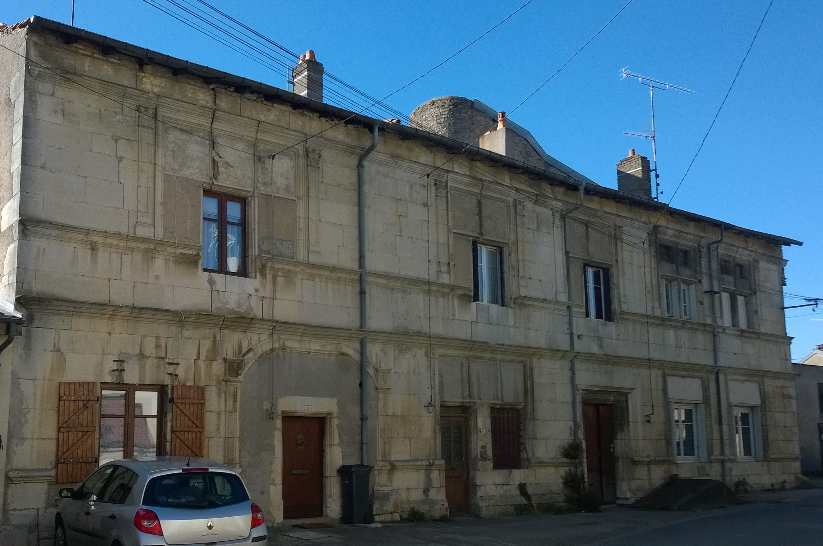 Maison des Loups du XIV et XVIème siècle au 6, 8 et 10 rue des Loups à Pulligny (Meurthe-et-Moselle, France) .